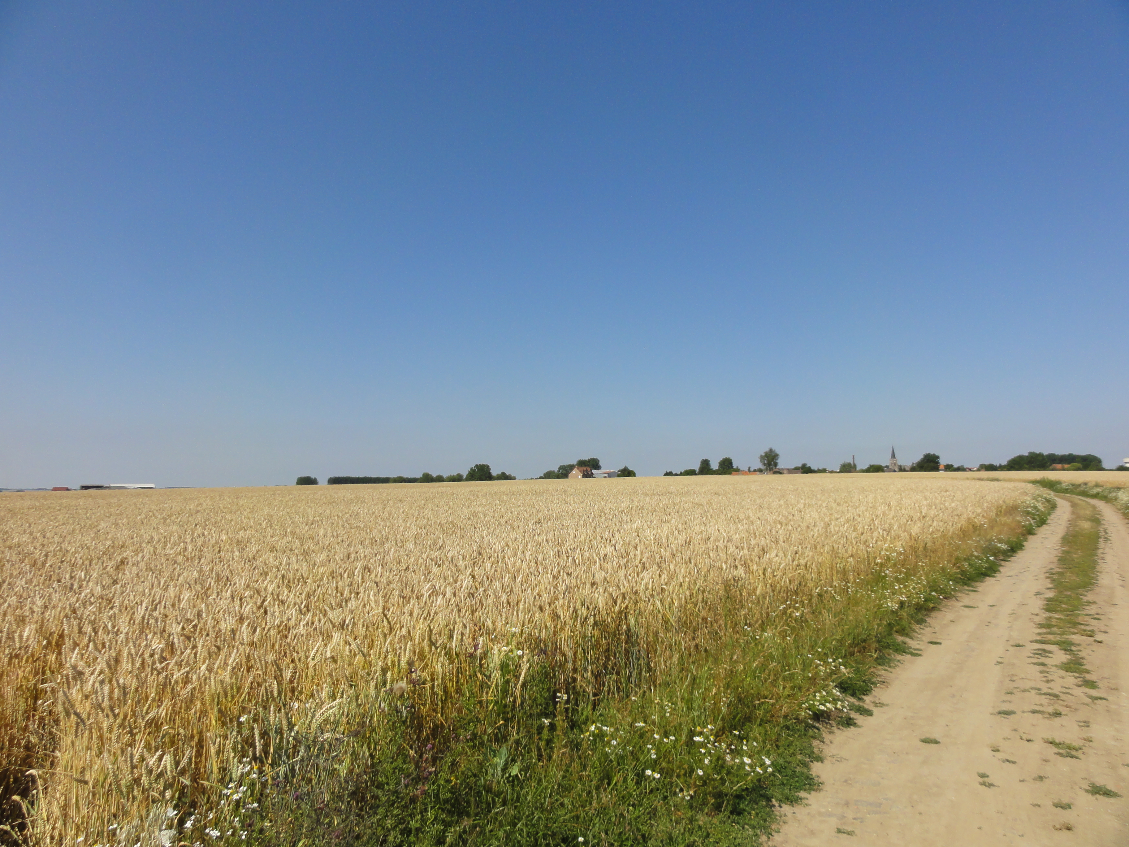 La Fosse de Fressain de la Compagnie des mines d'Aniche était un charbonnage constitué de deux puits situé à Fressain, Nord, Nord-Pas-de-Calais, France.